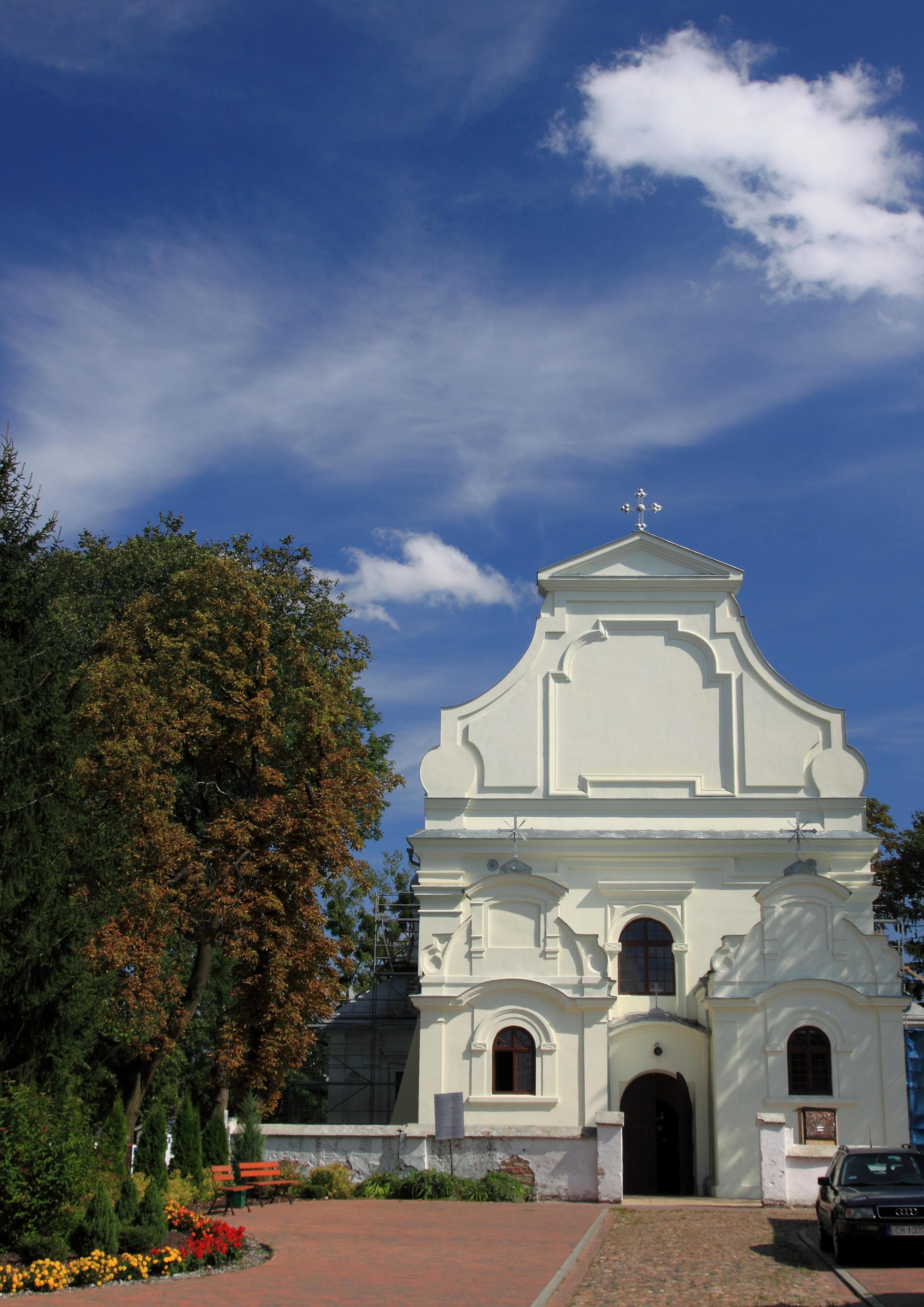 Kościół parafialny w Wojsławicach